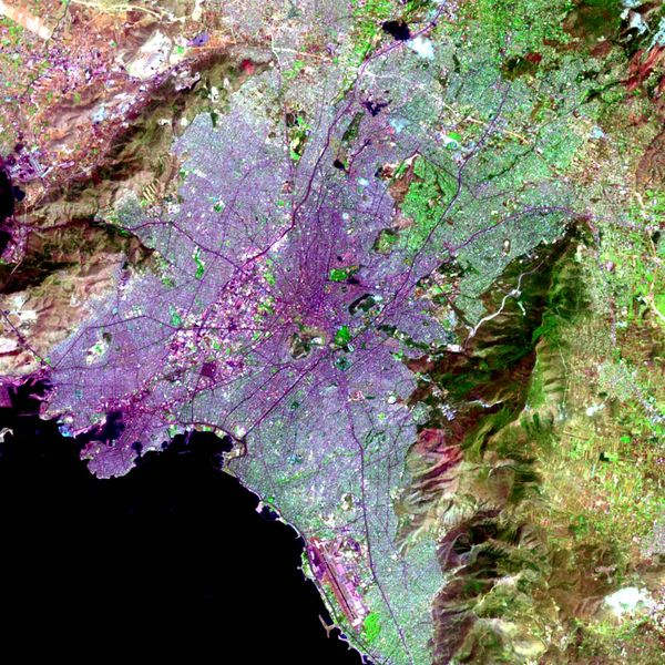 Η Αθήνα από ψηλά / Athens from above